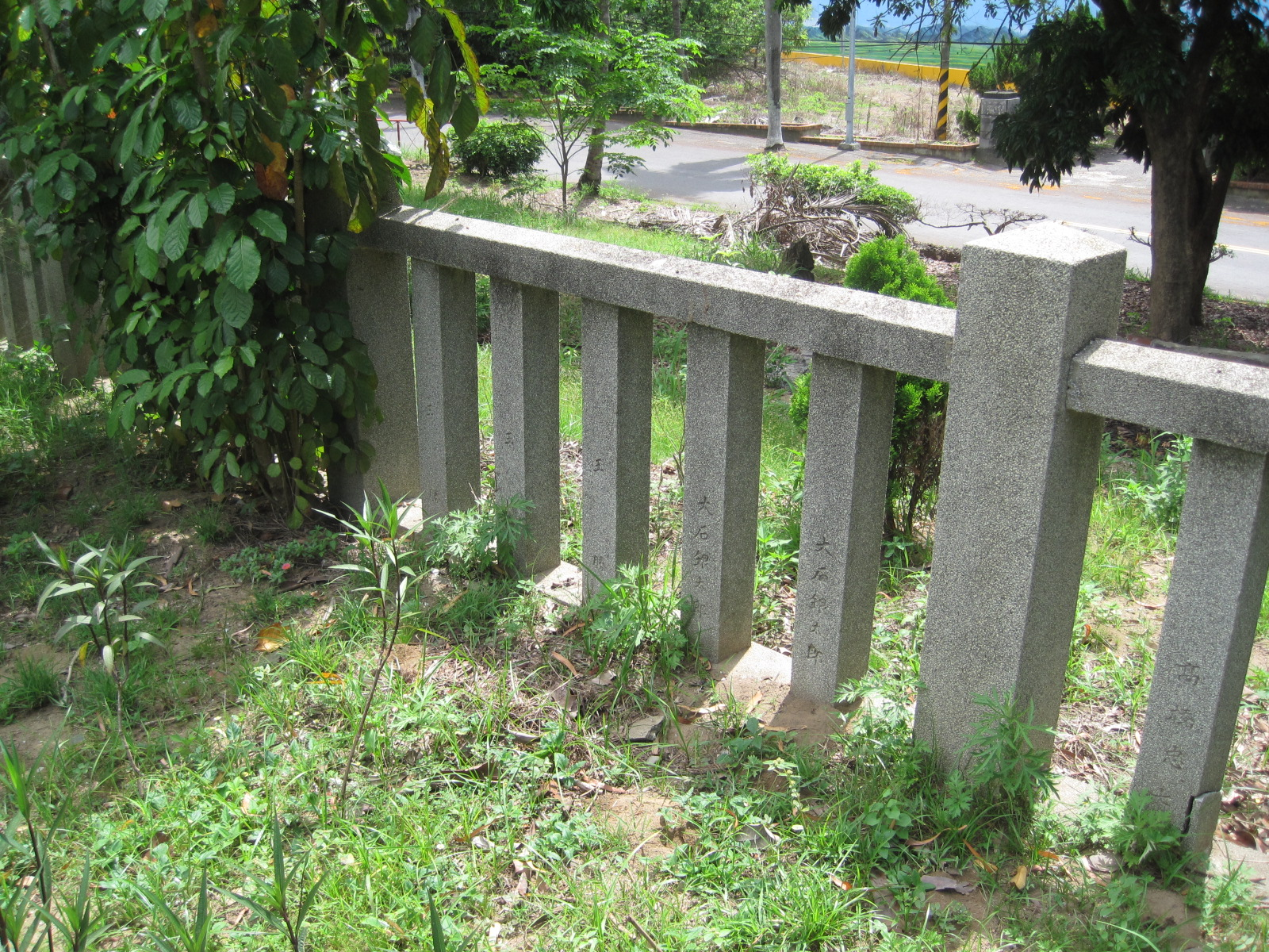 臺灣製糖車路墘製糖所虎山社玉垣。